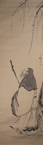 陶淵明 (とうえんめい)図